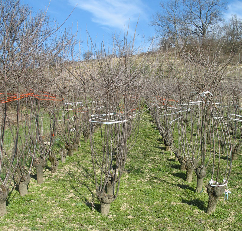 Weichselrohr-Kultur in Walbersdorf im Burgenland